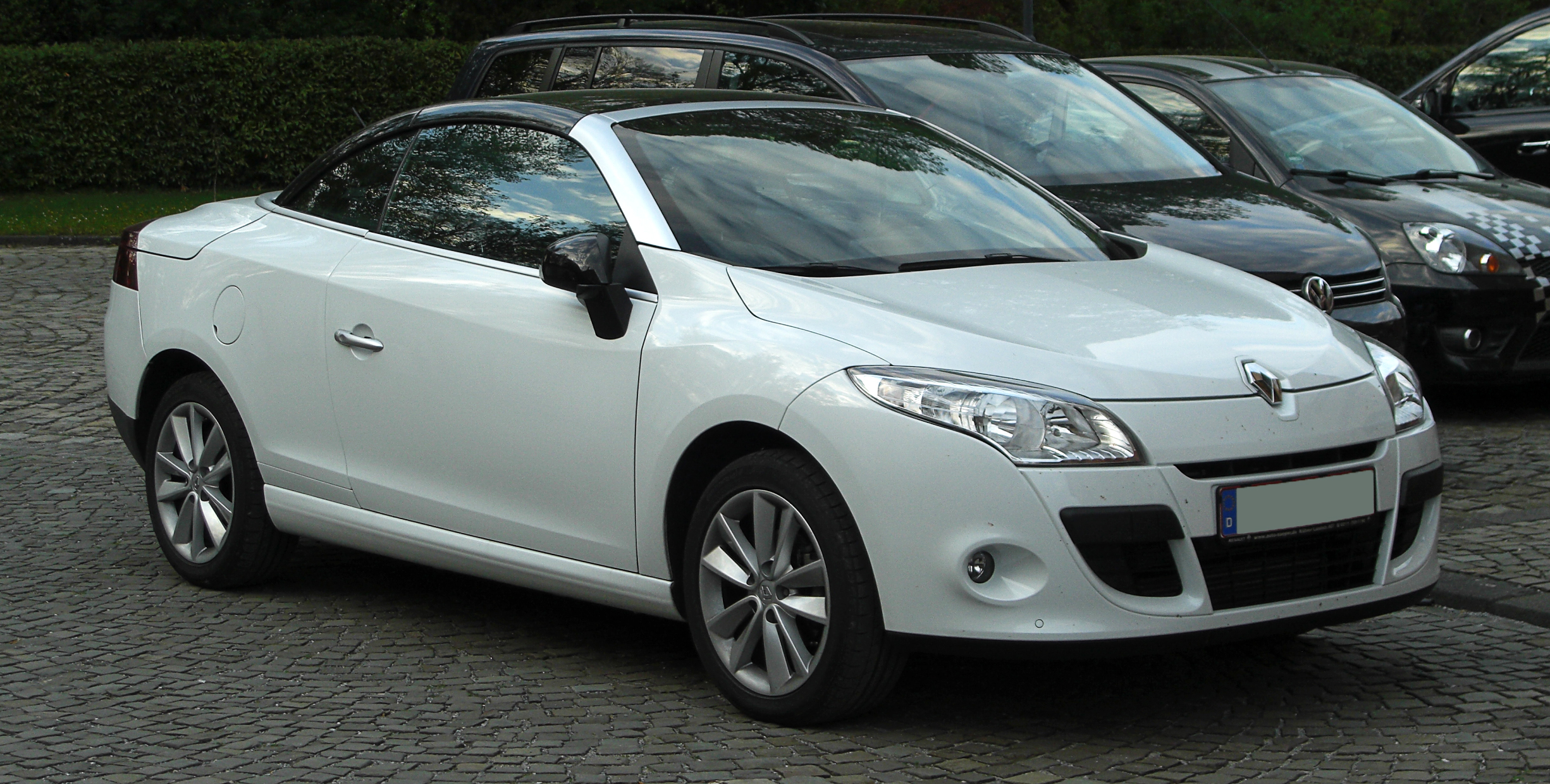 Renault Mégane CC (III)